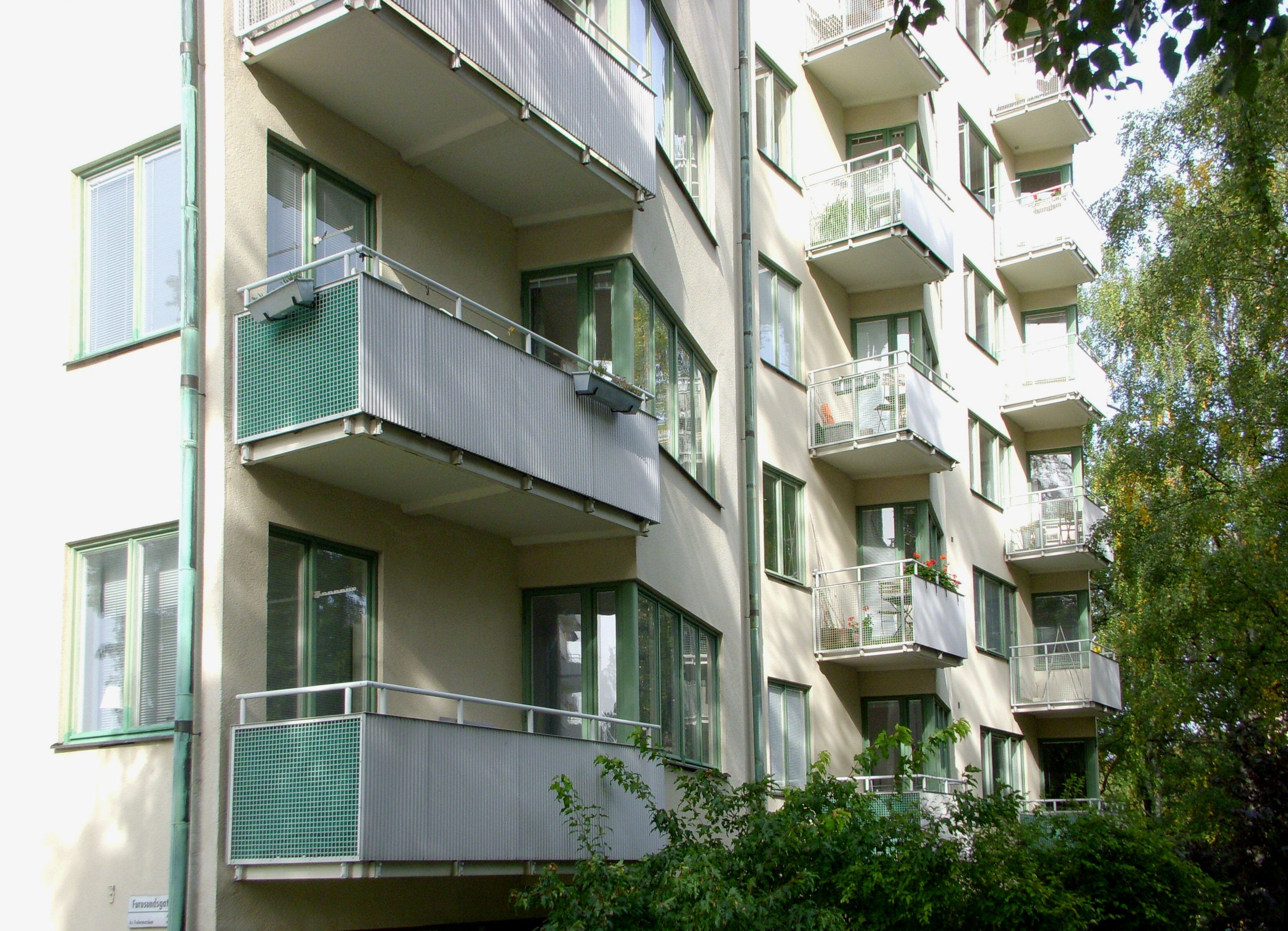 YK-huset på Östermalm, Stockholm